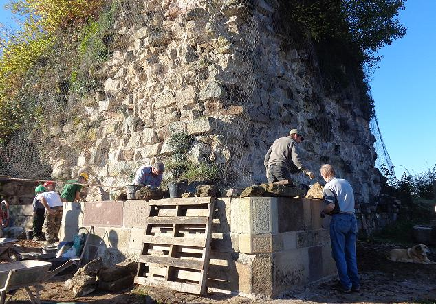 Bénévoles travaillant au reparementage du donjon du château de Fontenoy-le-Château, 2014.